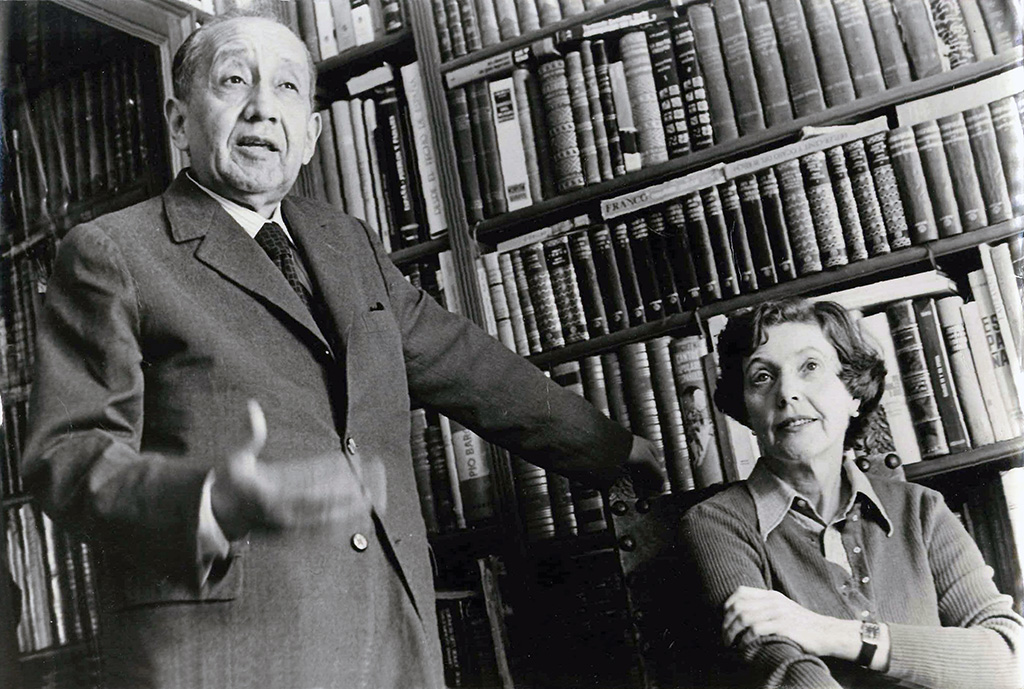 Bernardo Leighton junto a su esposa Ana Fresno. Bernardo Leighton Guzmán (Nacimiento, 16 de agosto de 1909-Santiago, 26 de enero de 1995) fue un abogado y político democratacristiano chileno, parlamentario, además de ministro de Estado de tres presidentes de su país. Destacó por ser uno de los más estrechos colaboradores de Eduardo Frei Montalva, jefe de Estado entre 1964 y 1970, y como enconado crítico del régimen militar que gobernó Chile entre 1973 y 1990. En 1975, durante su exilio en Europa, sobrevivió junto a su esposa, Ana Fresno (1912-2011), a un atentado perpetrado por agentes de extrema derecha.